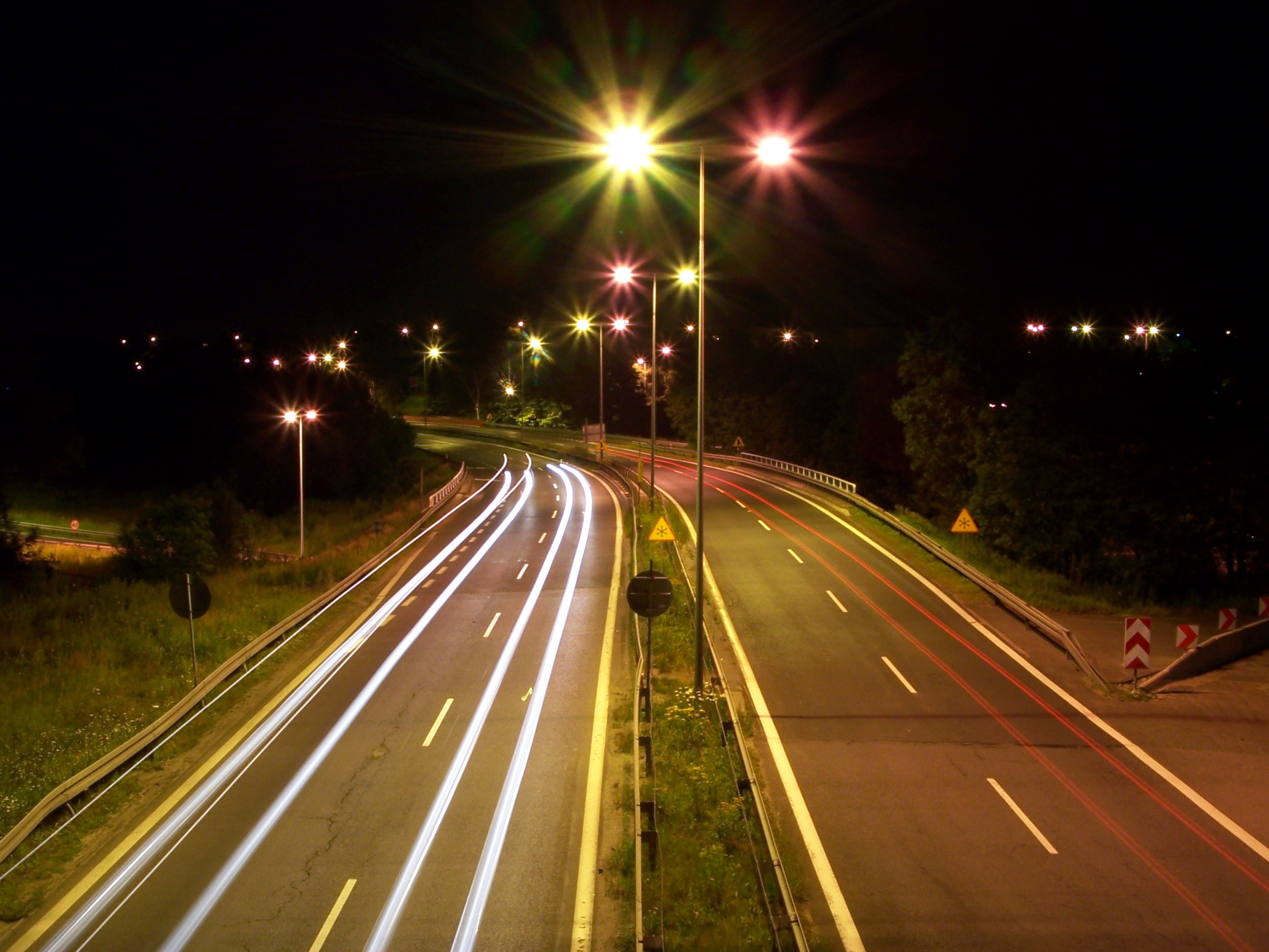 DK81 w Mikołowie nocą. Widok z wiaduktu na ul. Waryńskiego w kierunku Katowic.